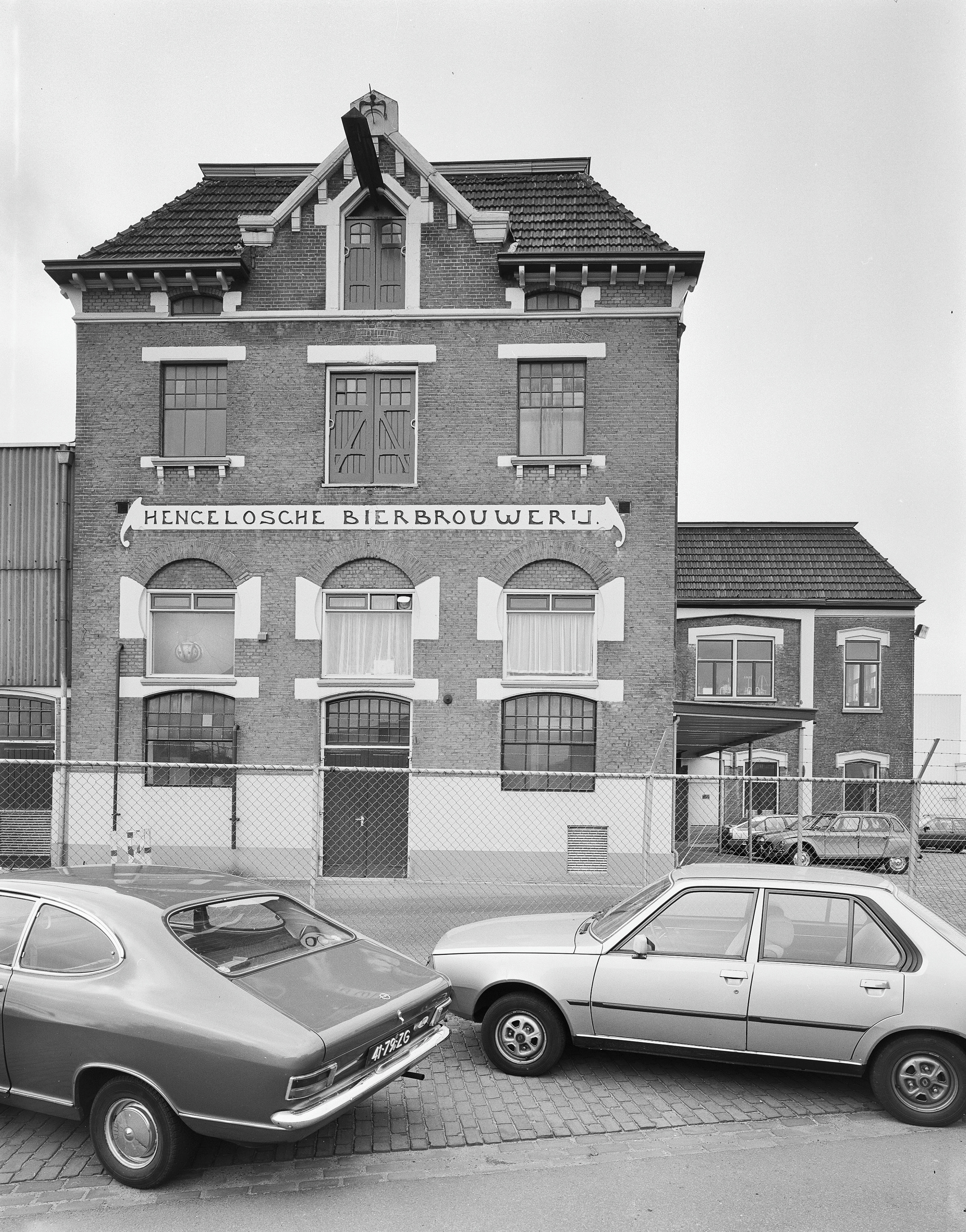 HENGELOSCHE BIERBROUWERIJ: Exterieur OVERZICHT